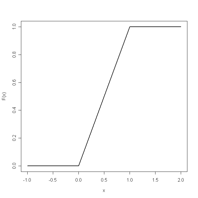 Categoria:Variabili casuali